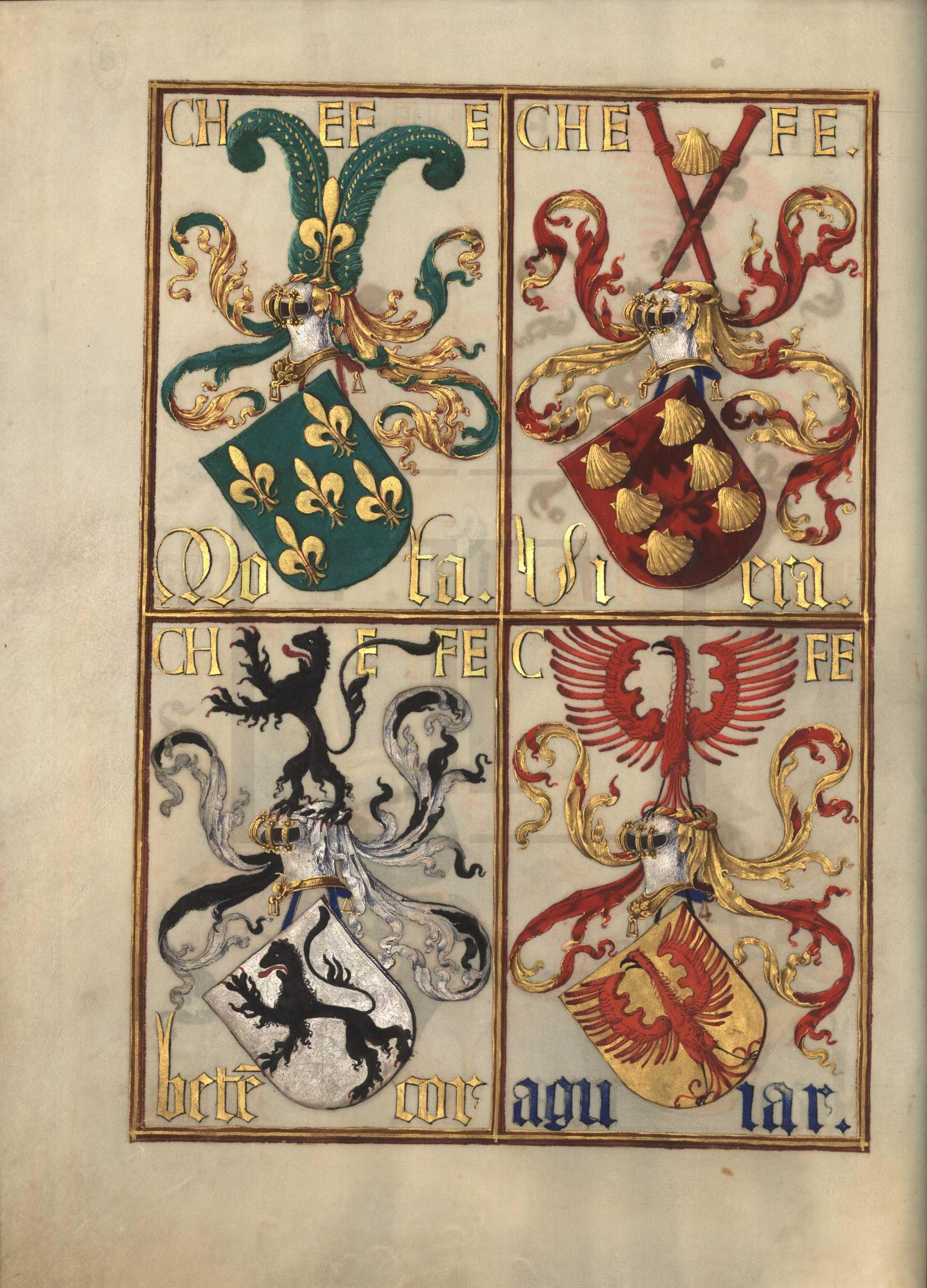 Livro da Nobreza e Perfeiçam das Armas (fl 16v)